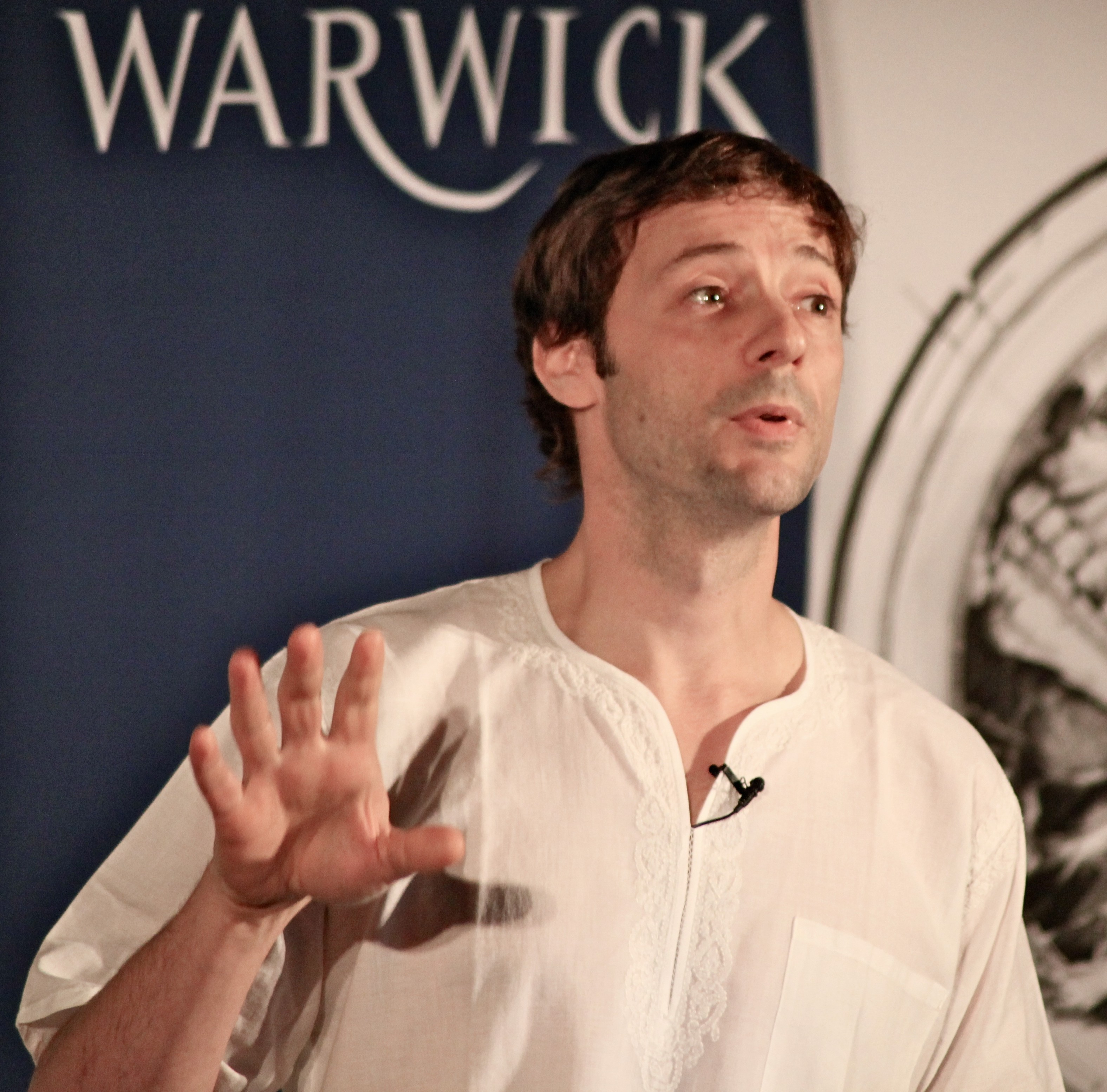 James Flint (novelist) at VirtualFutures